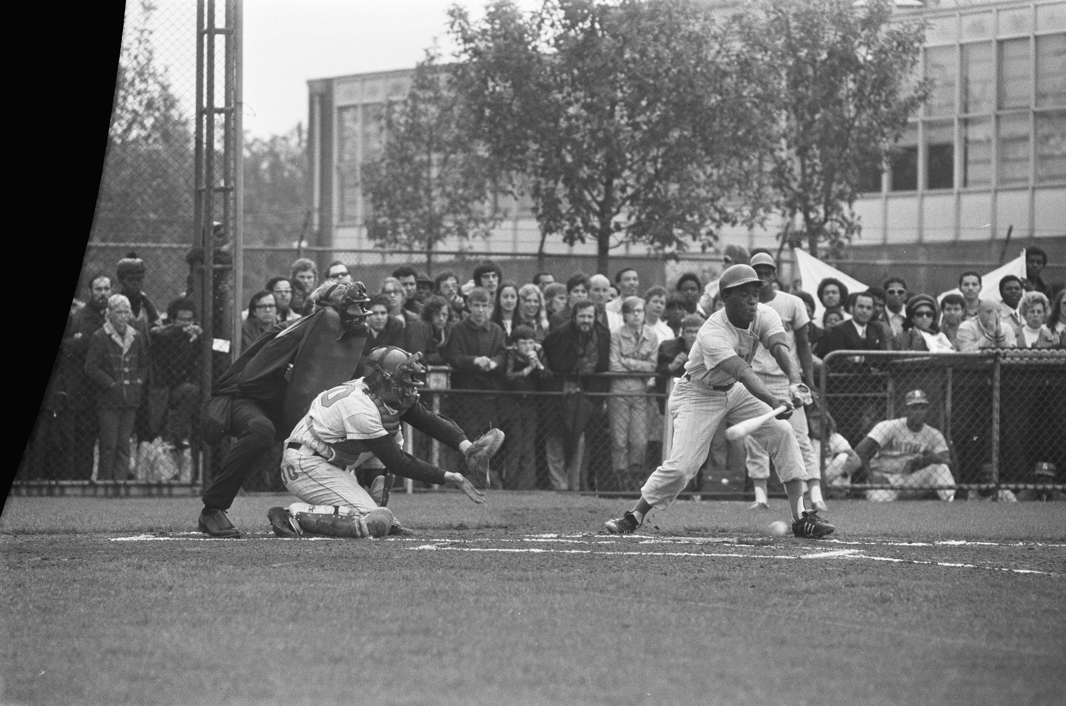 Collectie / Archief : Fotocollectie Anefo Reportage / Serie : [ onbekend ] Beschrijving : Haarlemse Honkbalweek, spelmoment Nederland tegen Nederlandse Antillen Datum : 9 juli 1972 Locatie : Haarlem Trefwoorden : honkbal Fotograaf : Peters, Hans / Anefo Auteursrechthebbende : Nationaal Archief Materiaalsoort : Negatief (zwart/wit) Nummer archiefinventaris : bekijk toegang 2.24.01.05 Bestanddeelnummer : 925-7285